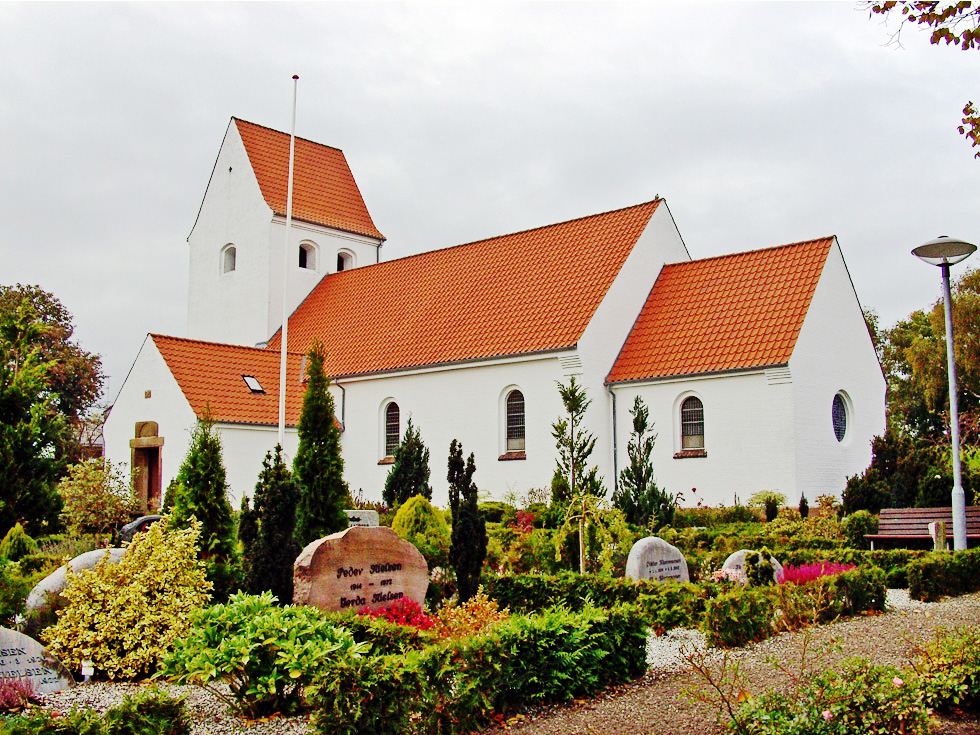 fra nordøst